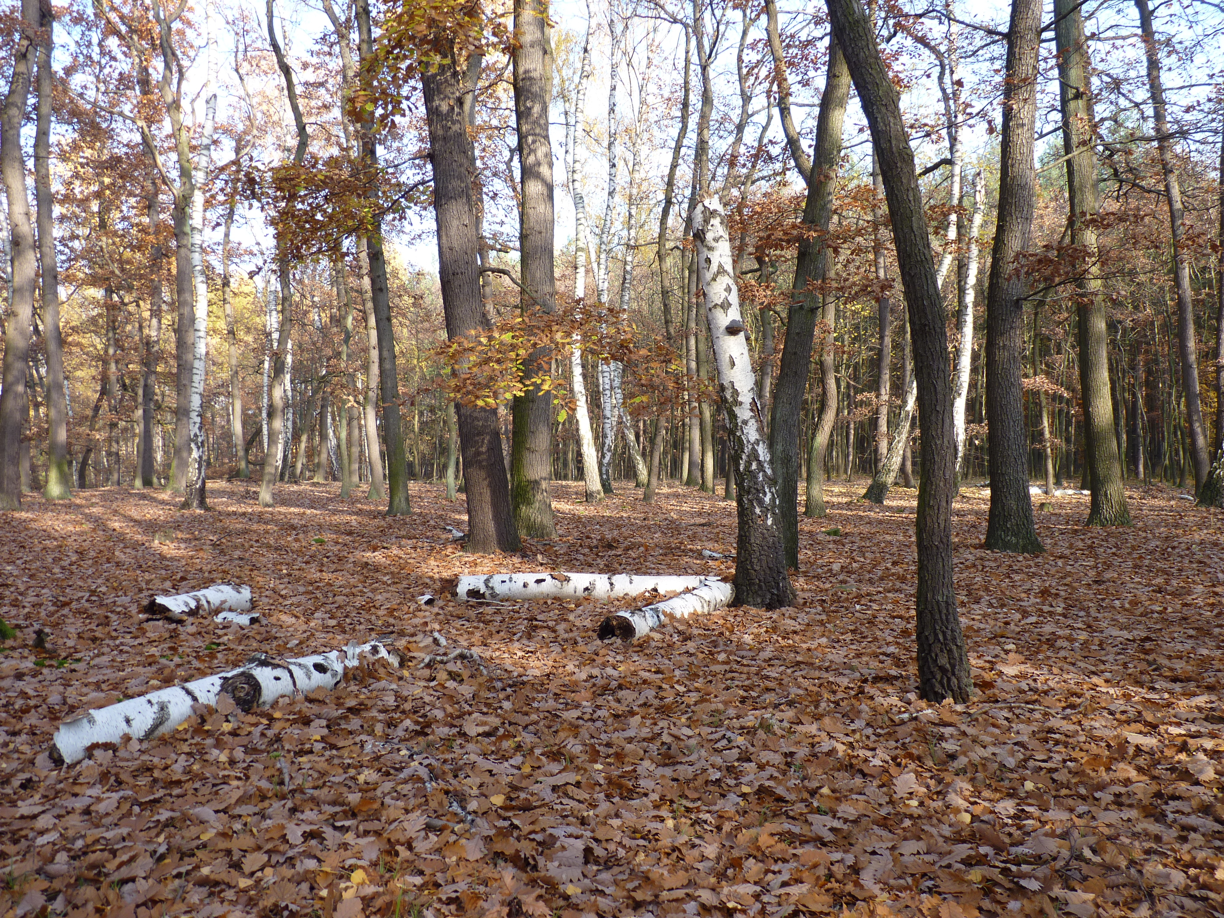 Národní přírodní rezervace Čtvrtě.